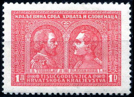 Одна из первых коммеморативных марок Королевства Югославия, 1929